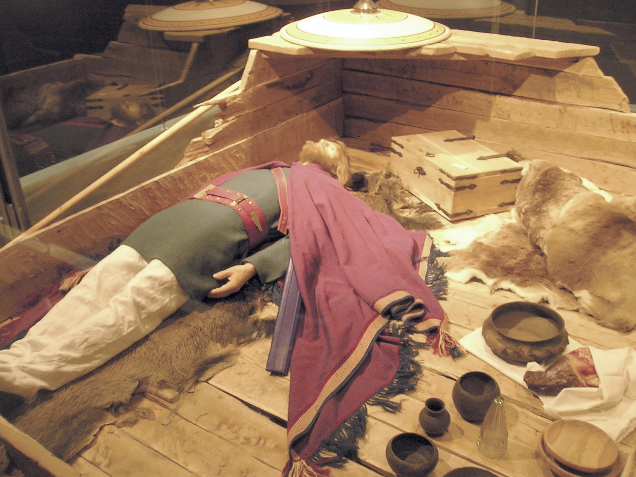 Nachbildung des 1990 entdeckten Grabes des Kriegers von Kemathen im Römer und Bajuwaren Museum auf der Burg Kipfenberg im oberbayerischen Landkreis Eichstätt.